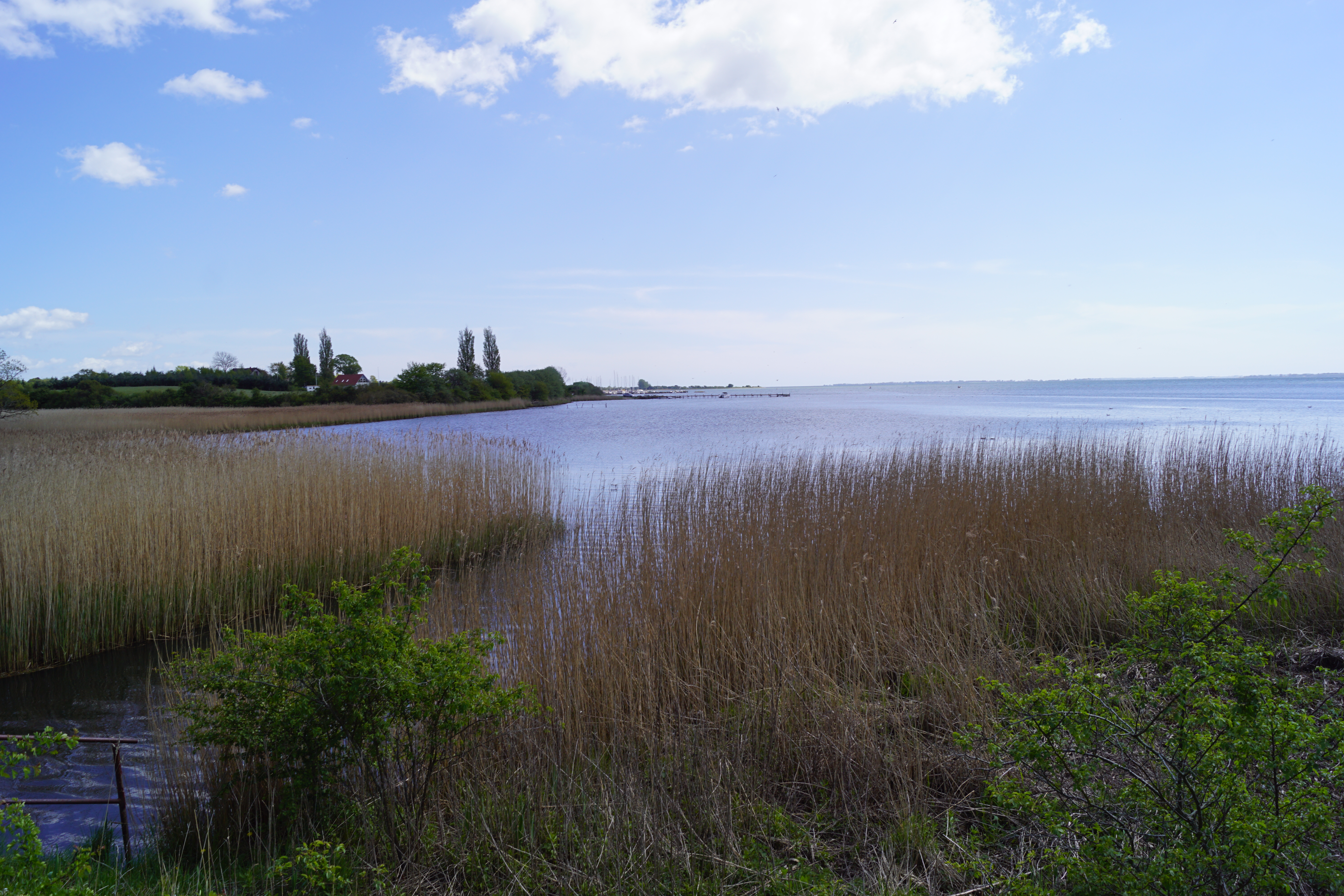 Nakkebølle Fjord på Sydfyn, set mod syd fra dæmningen ved Hundstup Ås udløb